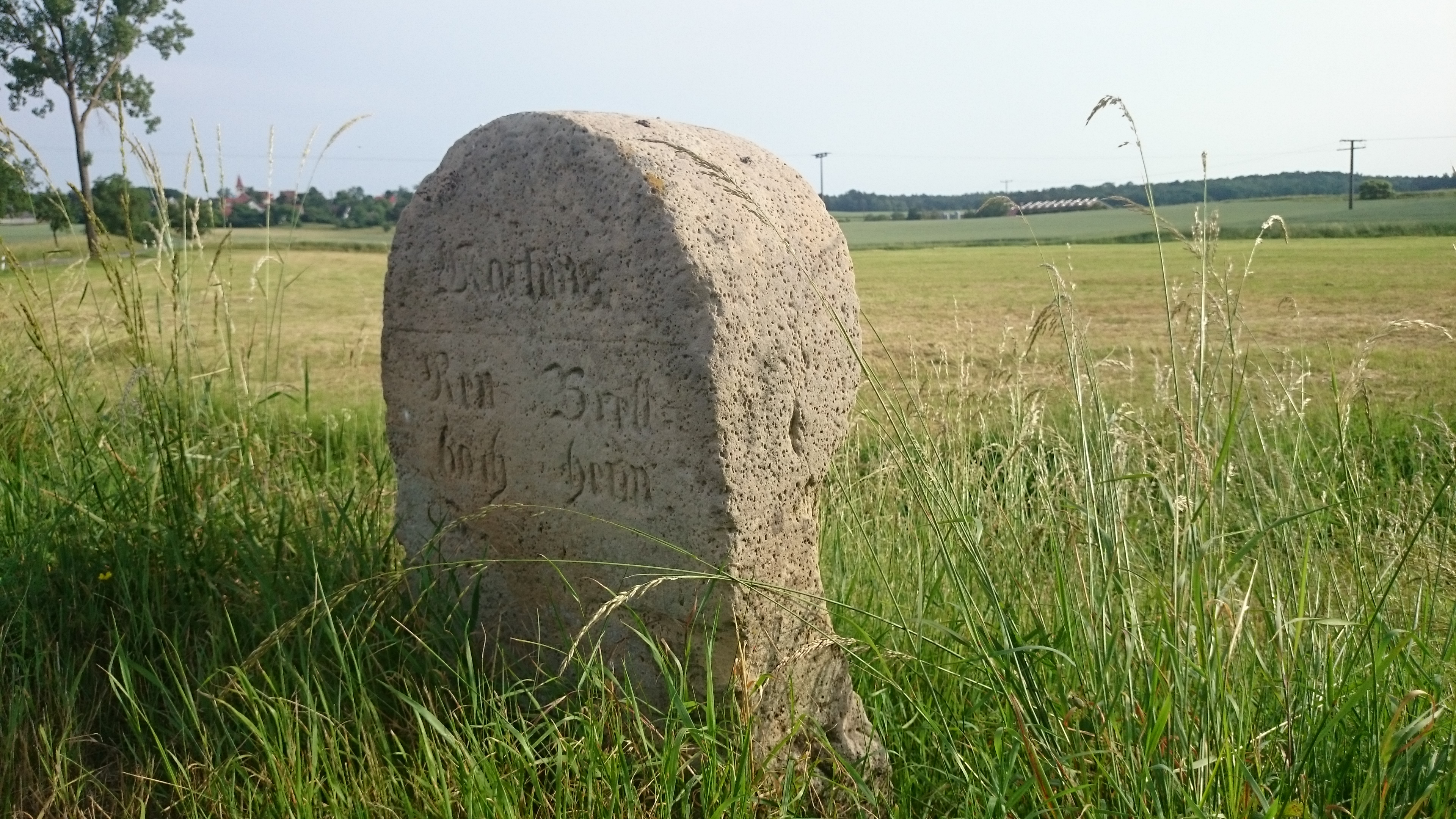 Markungsstein Reubach-Brettheim